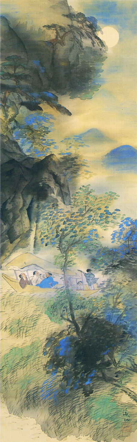 富田渓仙筆 前赤壁図